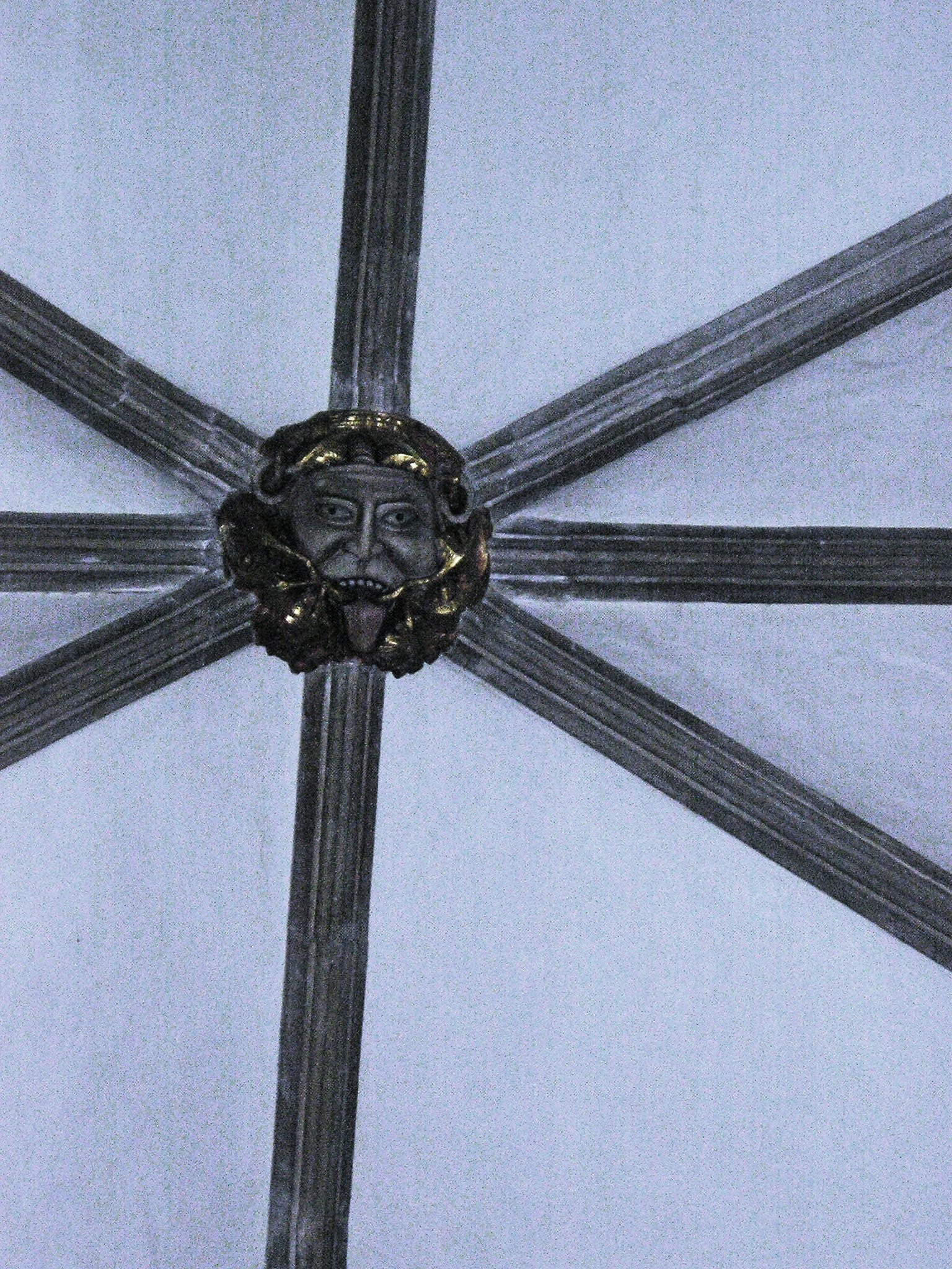 Crowland,_Croyland_Abbey,_Abschluss-Stein_Green-Man